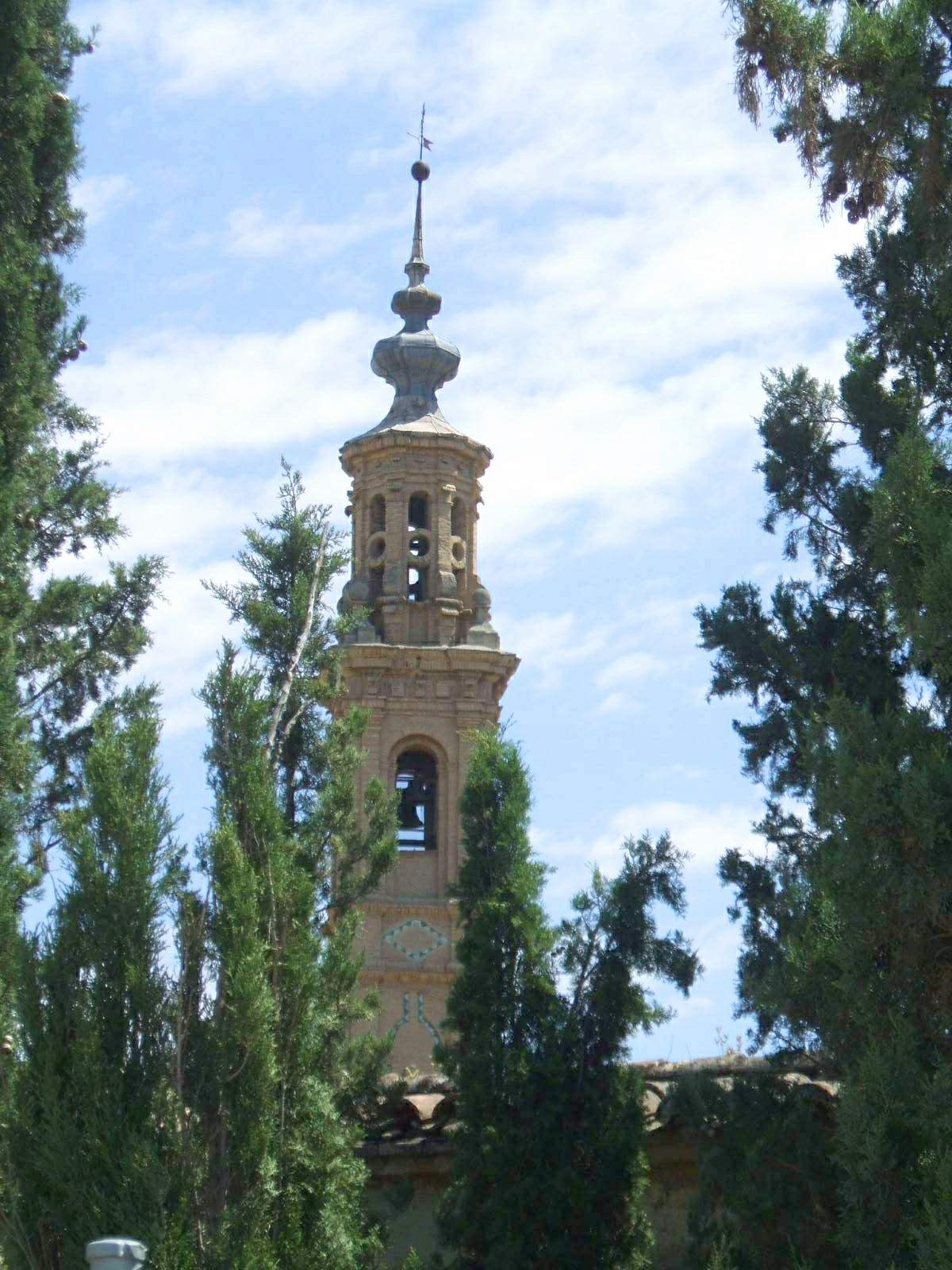 Zaragoza - Cartuja Aula Dei